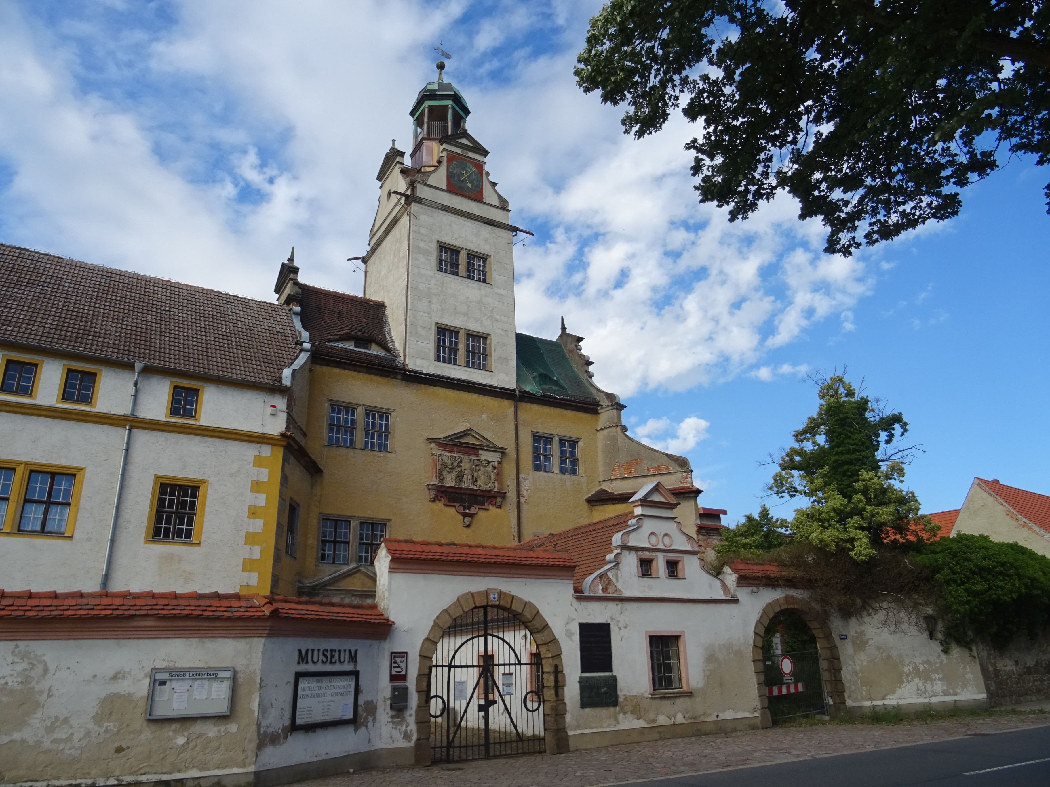 Schloss Lichtenburg in Prettin, Südseite, EIngang zum Museum